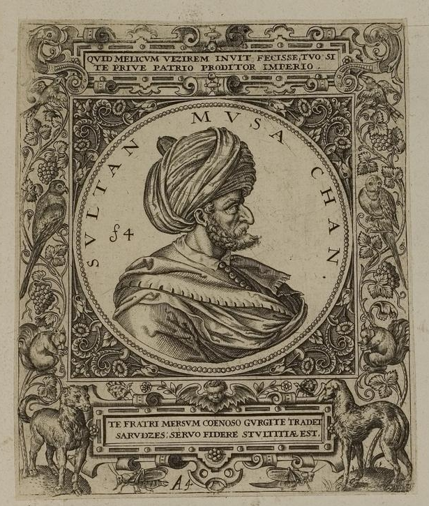 Grafik aus dem Klebeband Nr. 1 der Fürstlich Waldeckschen Hofbibliothek Arolsen Illustration aus: Georg Greblinger: Wahre Abbildungen der Türckischen Kayser vnd Persischen Fürsten / so wol auch anderer Helden und Heldinnen von dem Osman / biß auf den andern Mahomet. Johann Ammon, Frankfurt 1648 Motiv: "Sultan Musa Chan" (= Musa Çelebi, Bruder von Mehmed I., von diesem ermordet)